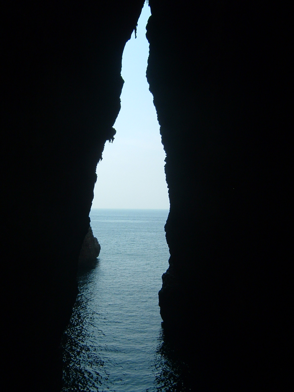 Foto scattata da me